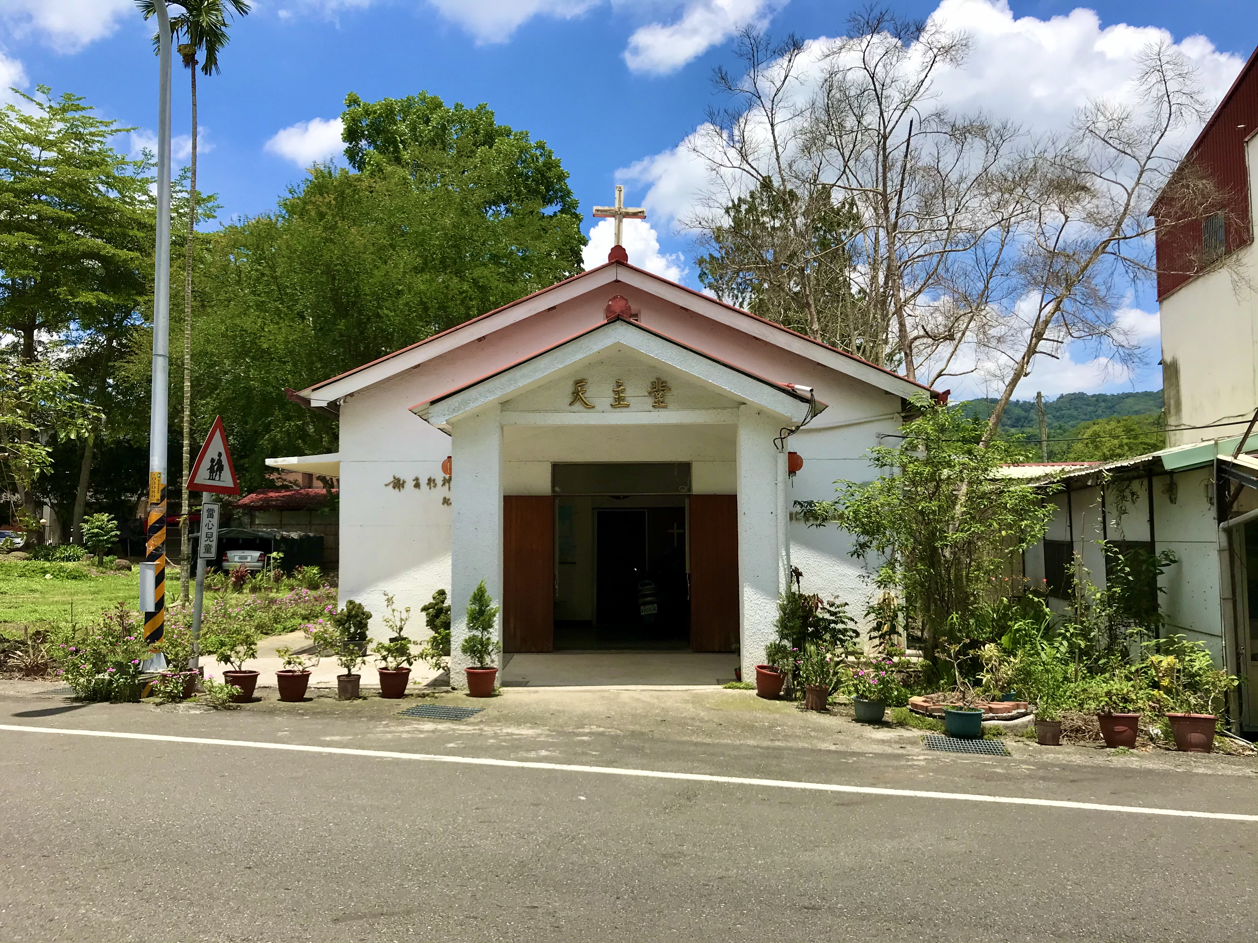 中文（台灣）: 南投鹿谷秀峰天主堂兼謝省躬神父紀念館